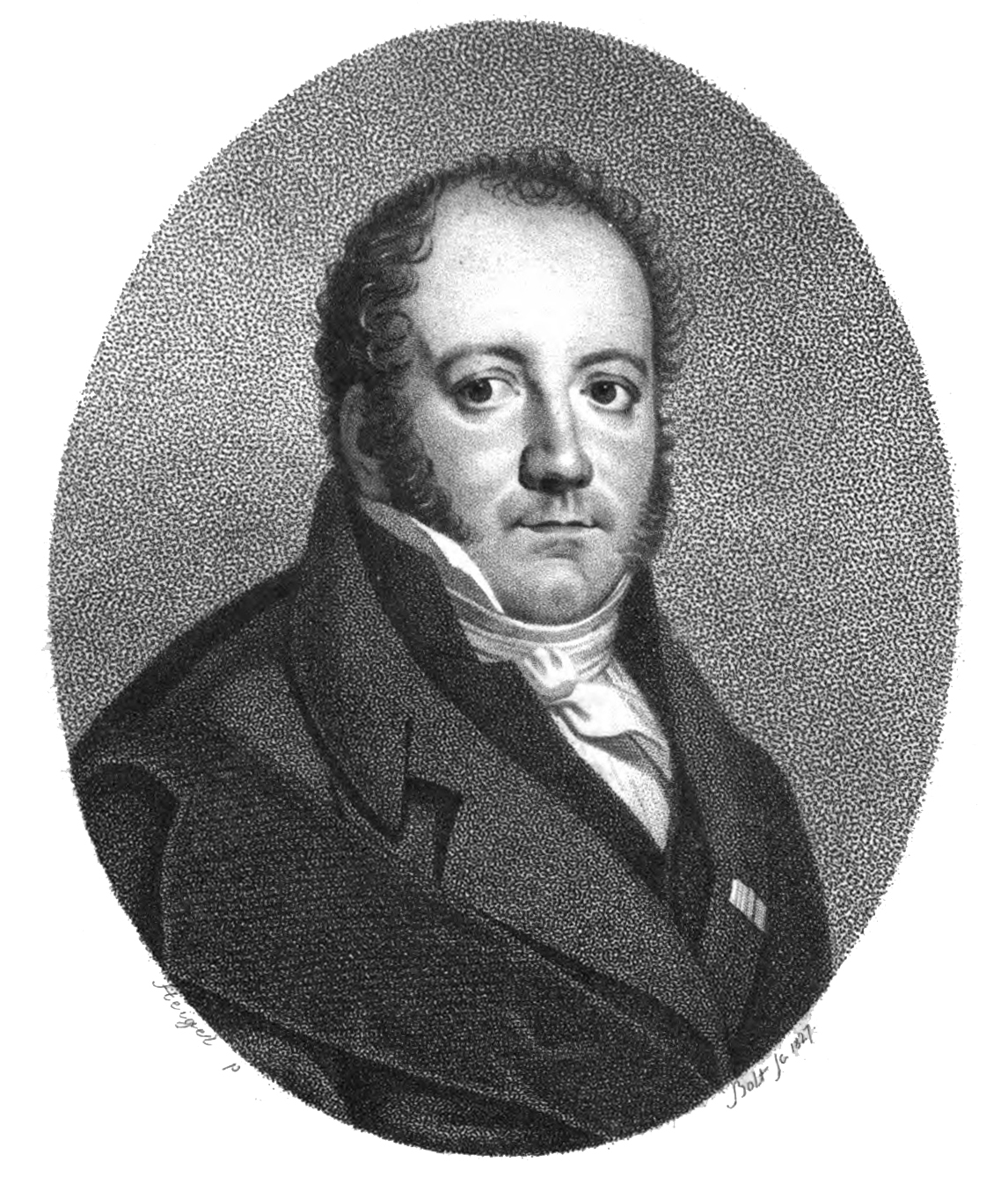 Portrait Johann Rehmann